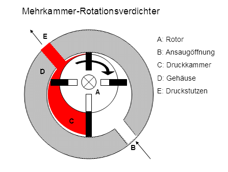 Die Abbildung zeigt das Prinzip eines Mehrkammer-Rotationsverdichters